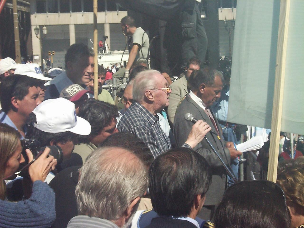 En Plaza de Mayo con motivo del 22 aniversario de la recuperación de las Islas Malvinas.